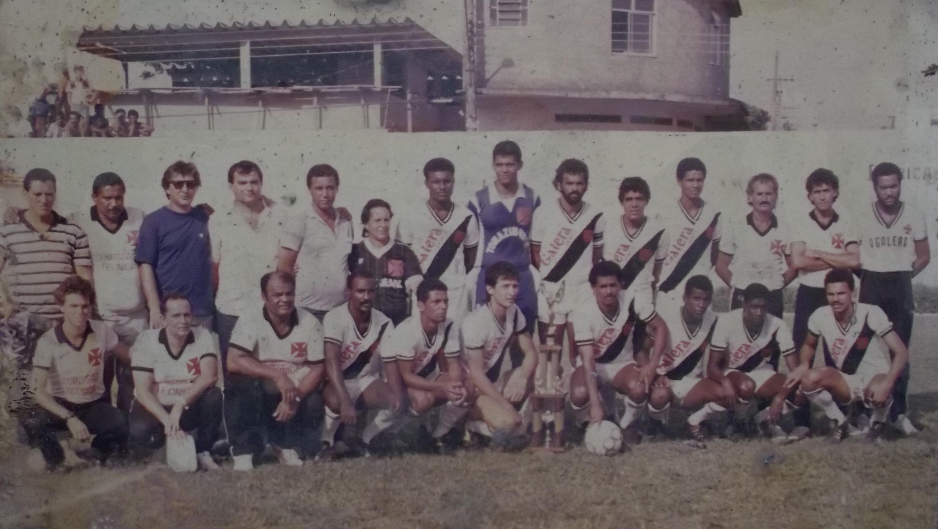 Foto do time do Tomazinho, campeão estadual da terceira divisão de 1986.